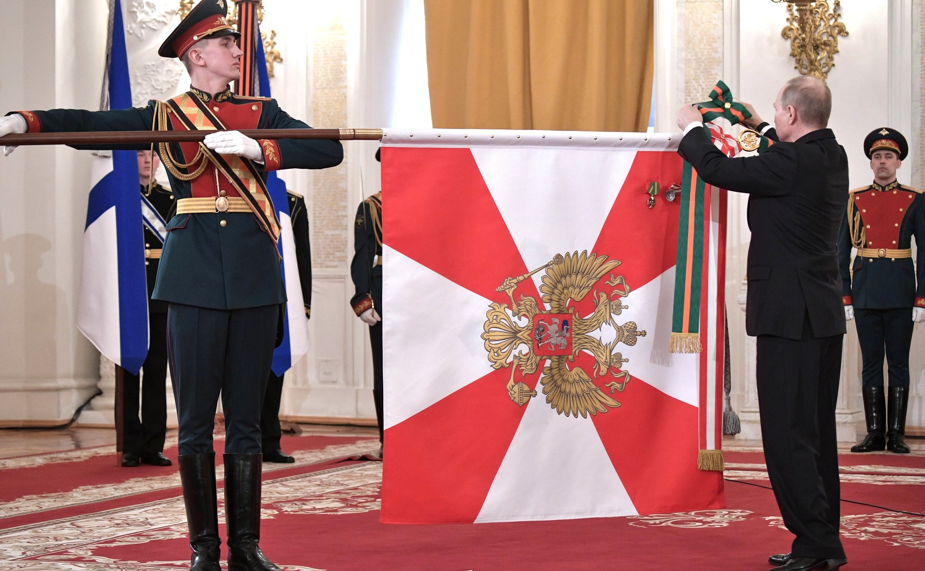 На церемонии вручения государственных наград Российской Федерации, приуроченной к празднованию Дня защитника Отечества. Президент России Владимир Путин прикрепляет ленту ордена Суворова на флаг Краснознамённого Южного военного округа